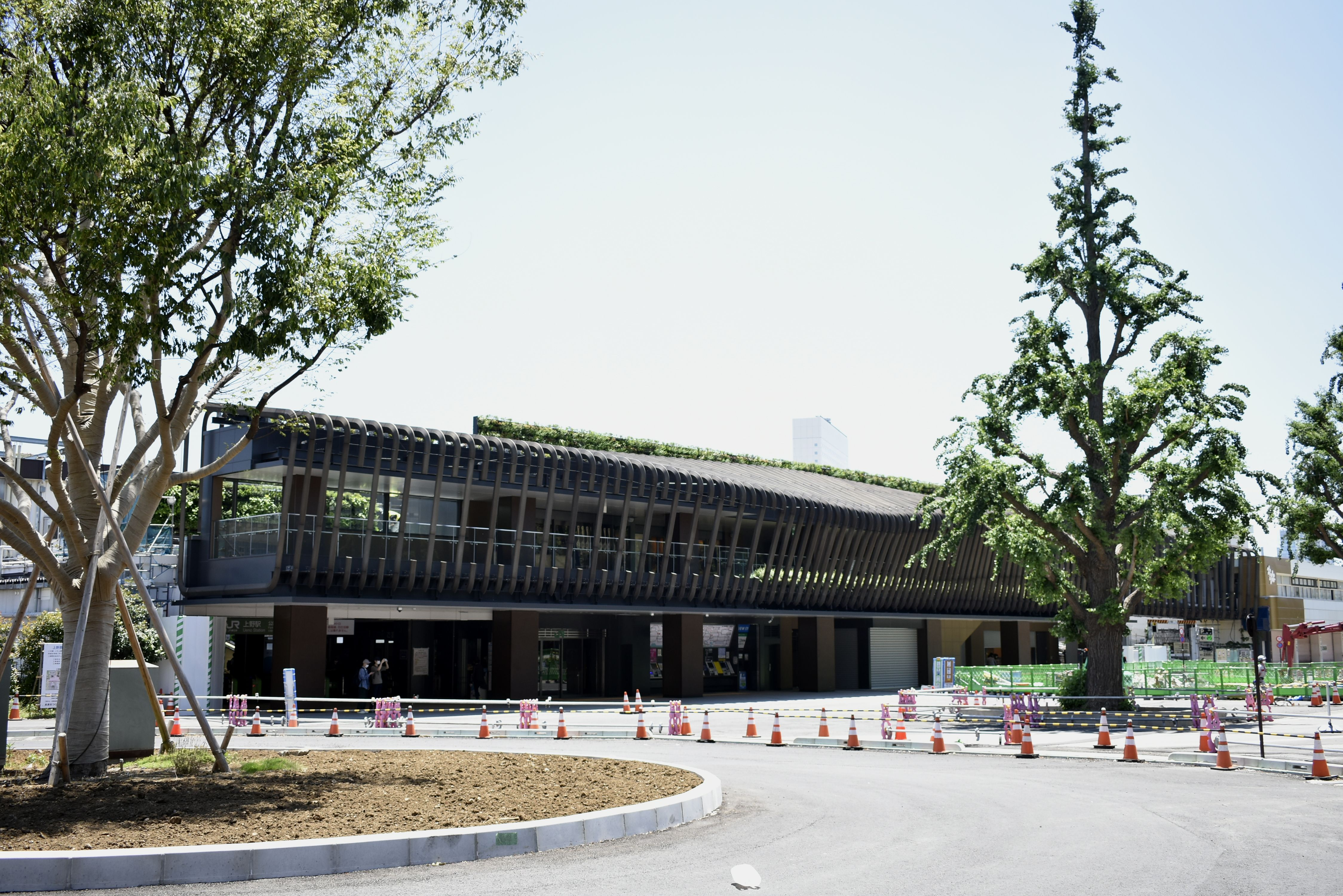 上野駅 公園口駅舎 Nikon D3400